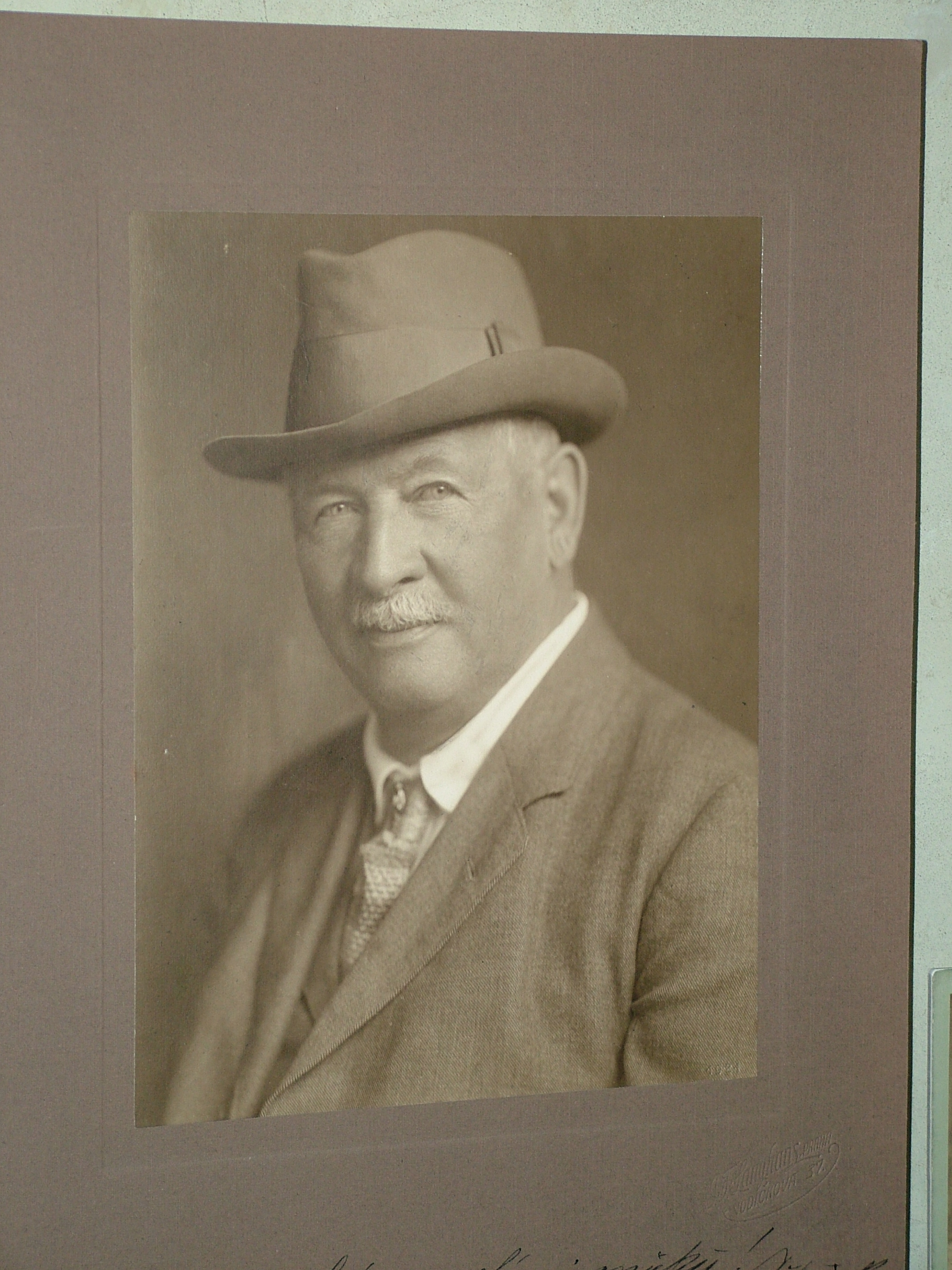 Fotografie z výstvay v Galerii Langhans, Praha